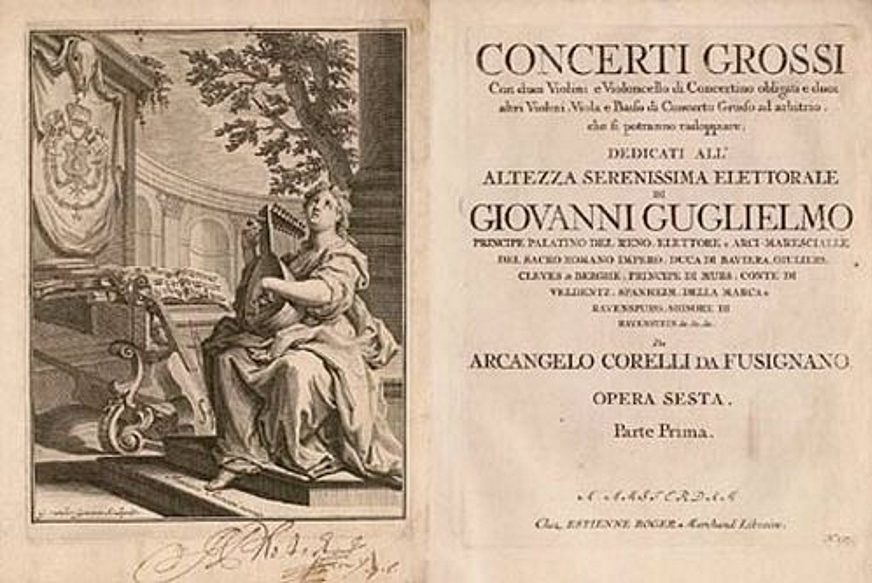 Capa do opus 6 de Arcangelo Corelli